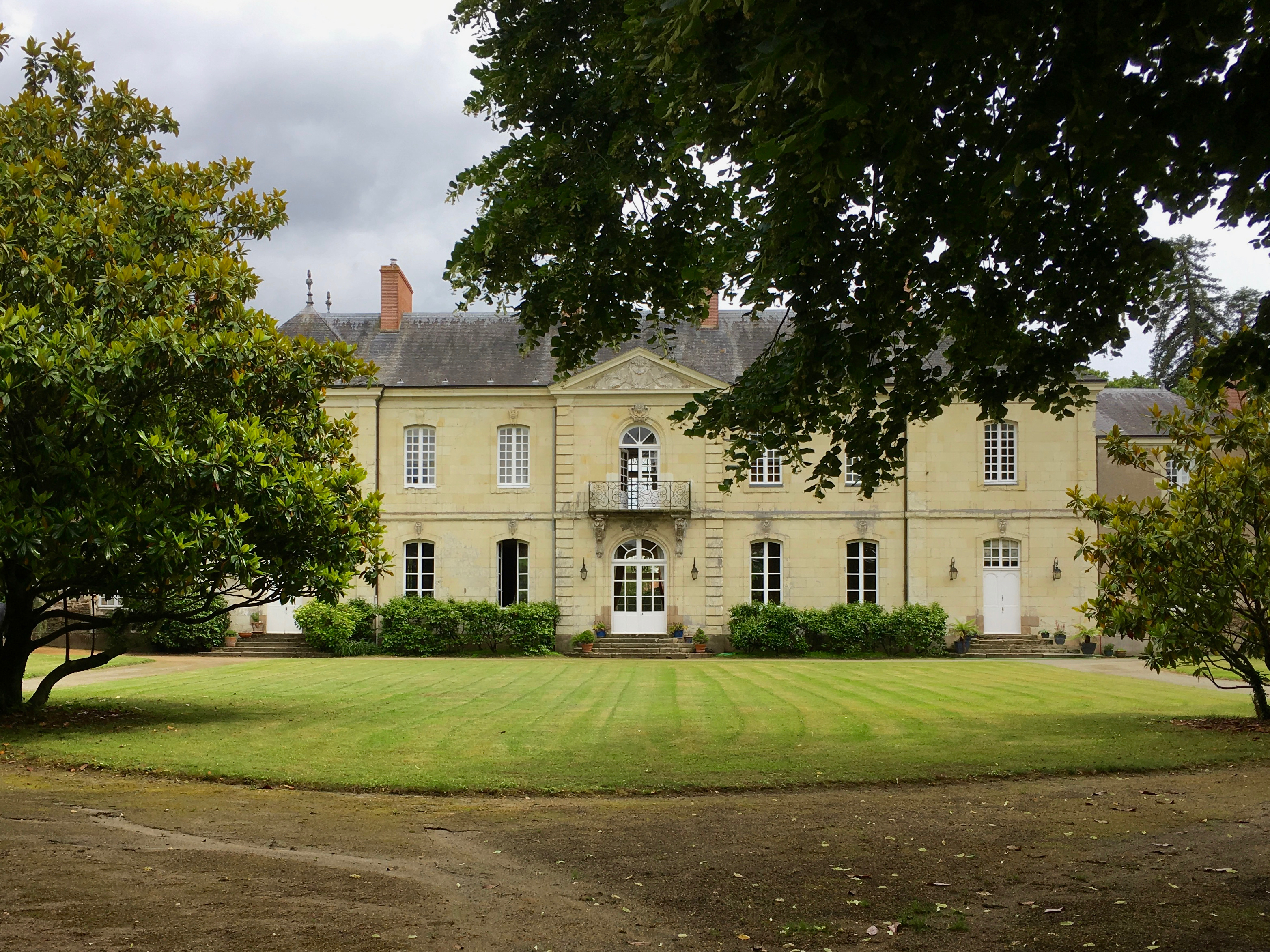 Façace principale de la Folie de la Gibraye